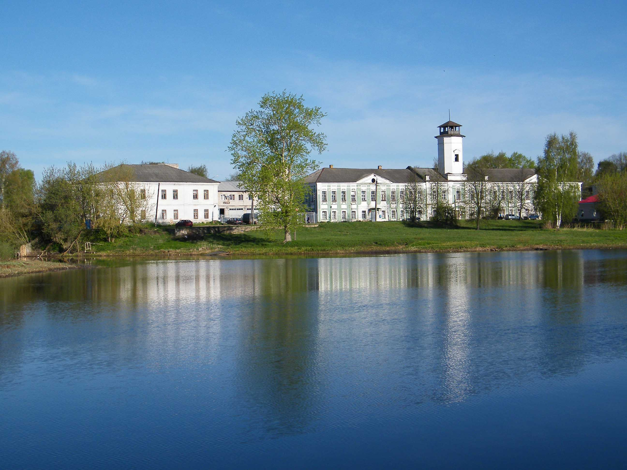 Берег озера